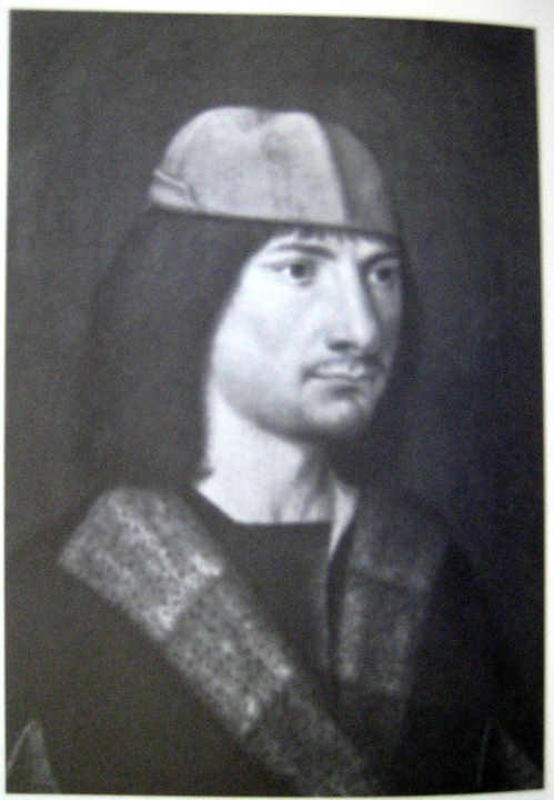 Ritratto di anonimotitle QS:P1476,it:"Ritratto di anonimo" label QS:Lit,"Ritratto di anonimo"